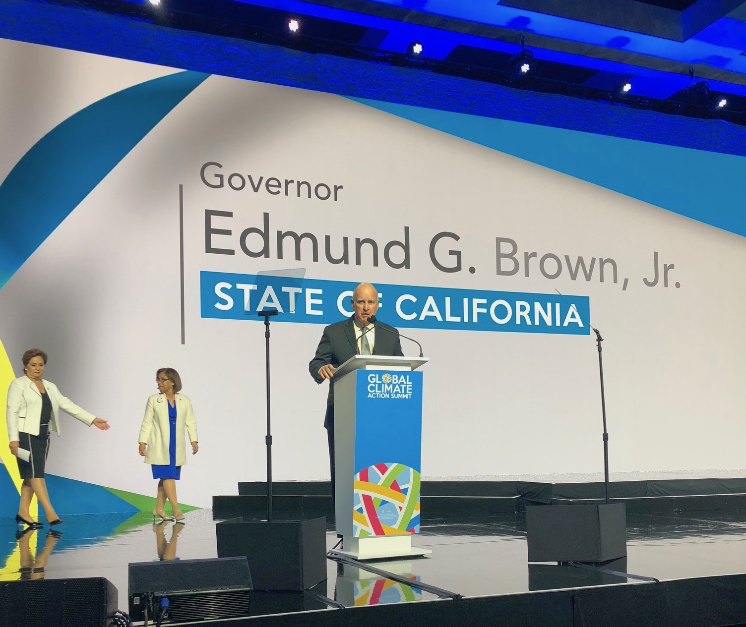 Global Climate Action Summit